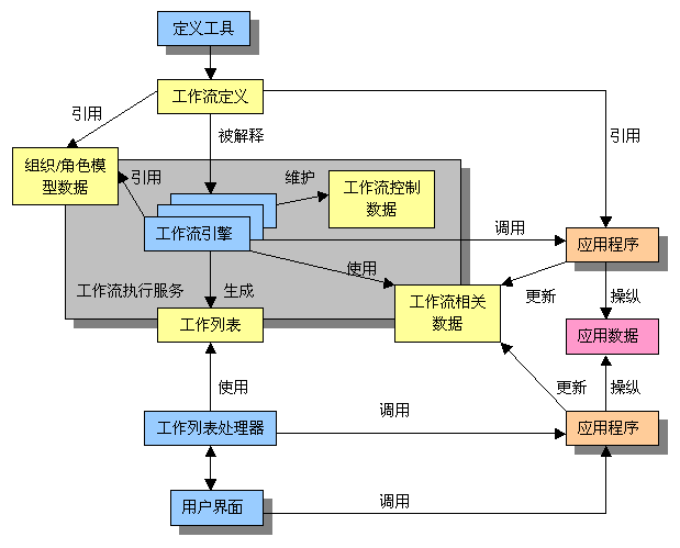 工作流管理系统产品结构，参照zh:工作流参考模型由提供者自己制作。